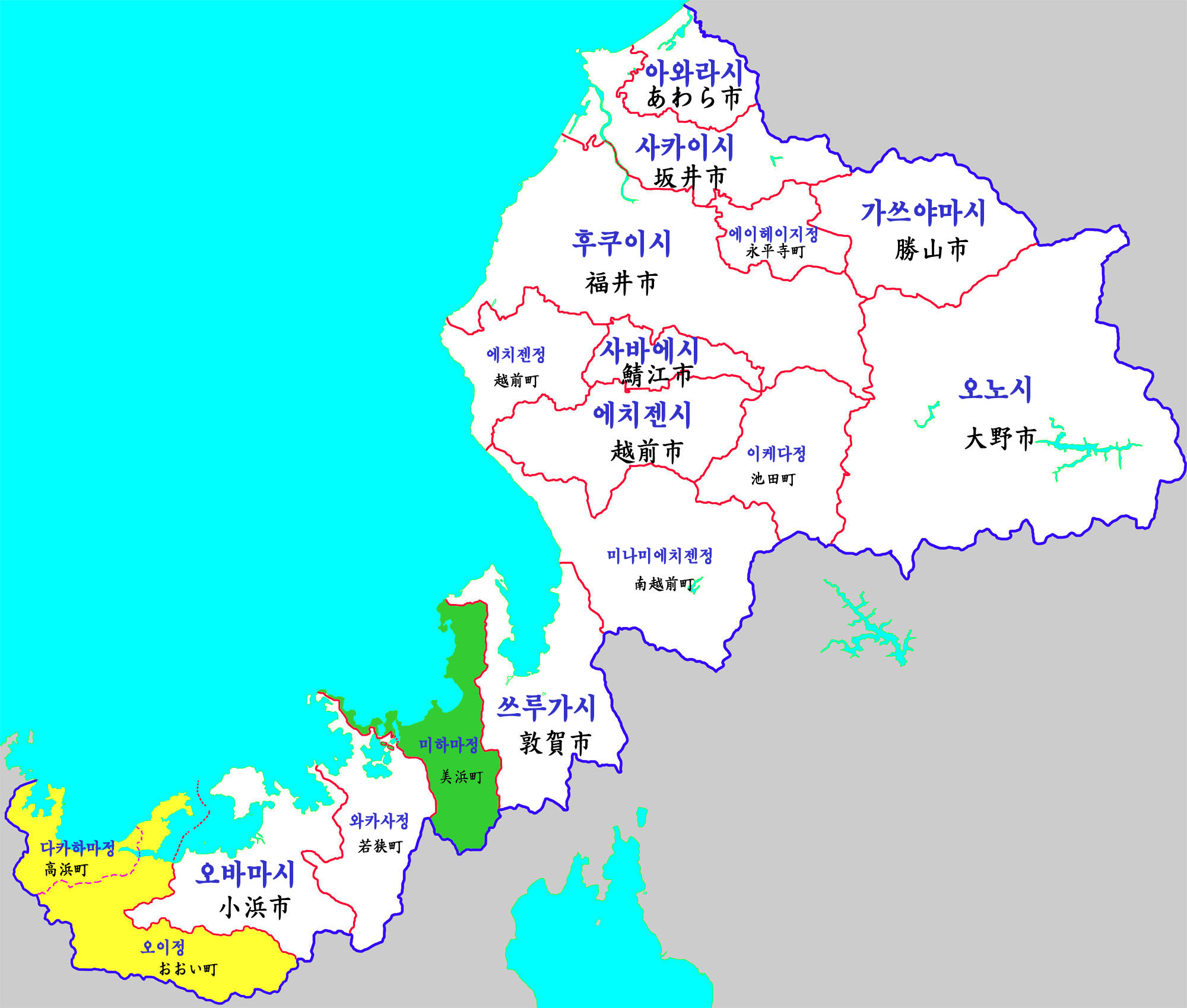 후쿠이현 행정구역